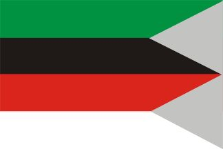 Vlajka obce Beloveža, Slovensko